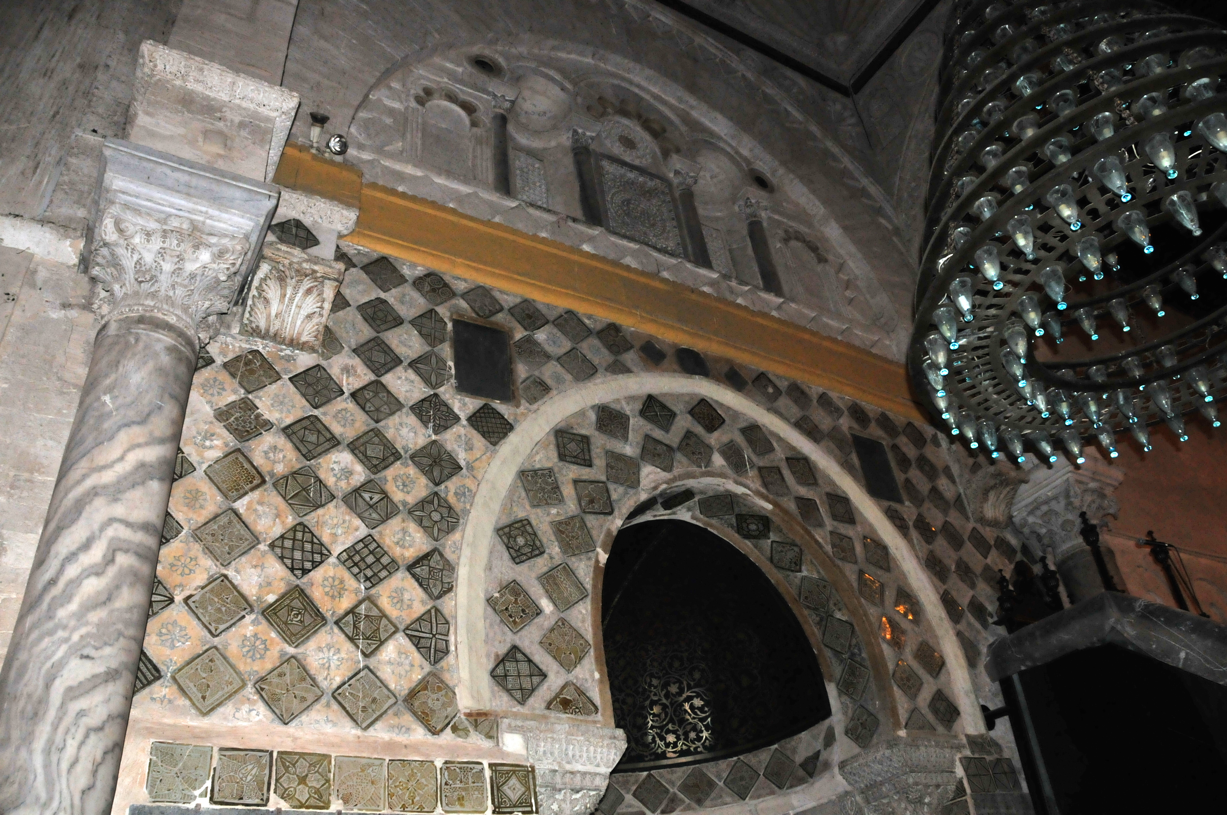 Vue de la partie supérieure du mihrab dans la salle de prière de la Grande Mosquée de Kairouan, en Tunisie.